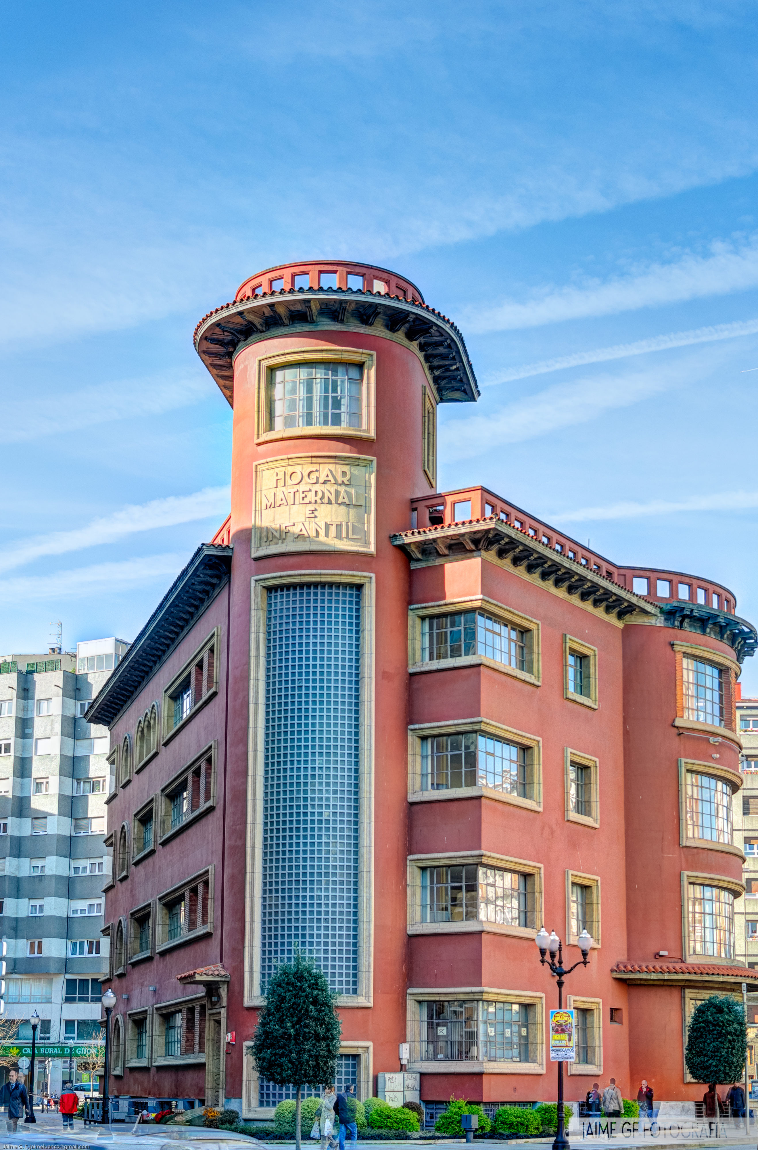 Después de veinticinco años de funcionamiento del Instituto de Puericultura,La gota leche) y ante la carencia de algunos servicios que se consideraban indispensables en la atención de madres y niños, el doctor González planteó la necesidad de una nueva obra, alumbrando así el Hogar Maternal e Infantil. El mismo quedó instalado desde 1949 en un edificio de corte racionalista de nueva planta obra del arquitecto Pedro Cabello Maíz. En este centro se instalaron los servicios de higiene y desinfección, comedor de embarazadas y lactantes (servicio creado después de la guerra por la Junta de Protección para atender las necesidades alimenticias de estos colectivos en aquellos tiempos de crisis), las escuelas maternales (donde se atendía a los niños de las mujeres trabajadoras de nueve de la mañana a seis de la tarde), la escuela hogar de madres, pensada para dotar a las mujeres de conocimientos útiles para la «crianza de su prole y convivencia feliz con su marido», el refugio u hogar infantil (su finalidad era terminar con la mendicidad infantil), así como los servicios de pesaje y fichaje escolar. Actualmente es un edificio de servicios del Ayuntamiento de Gijón.